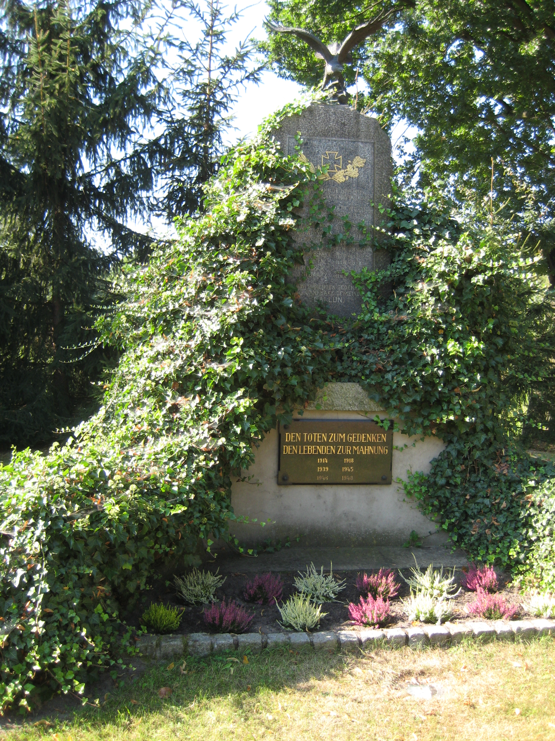 Denkmal 1. und 2.Weltkrieg Gallun